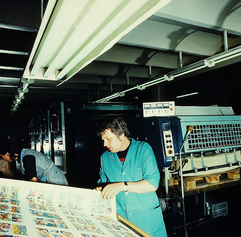 Original image description from the Deutsche FotothekFacharbeiter für Drucktechnik